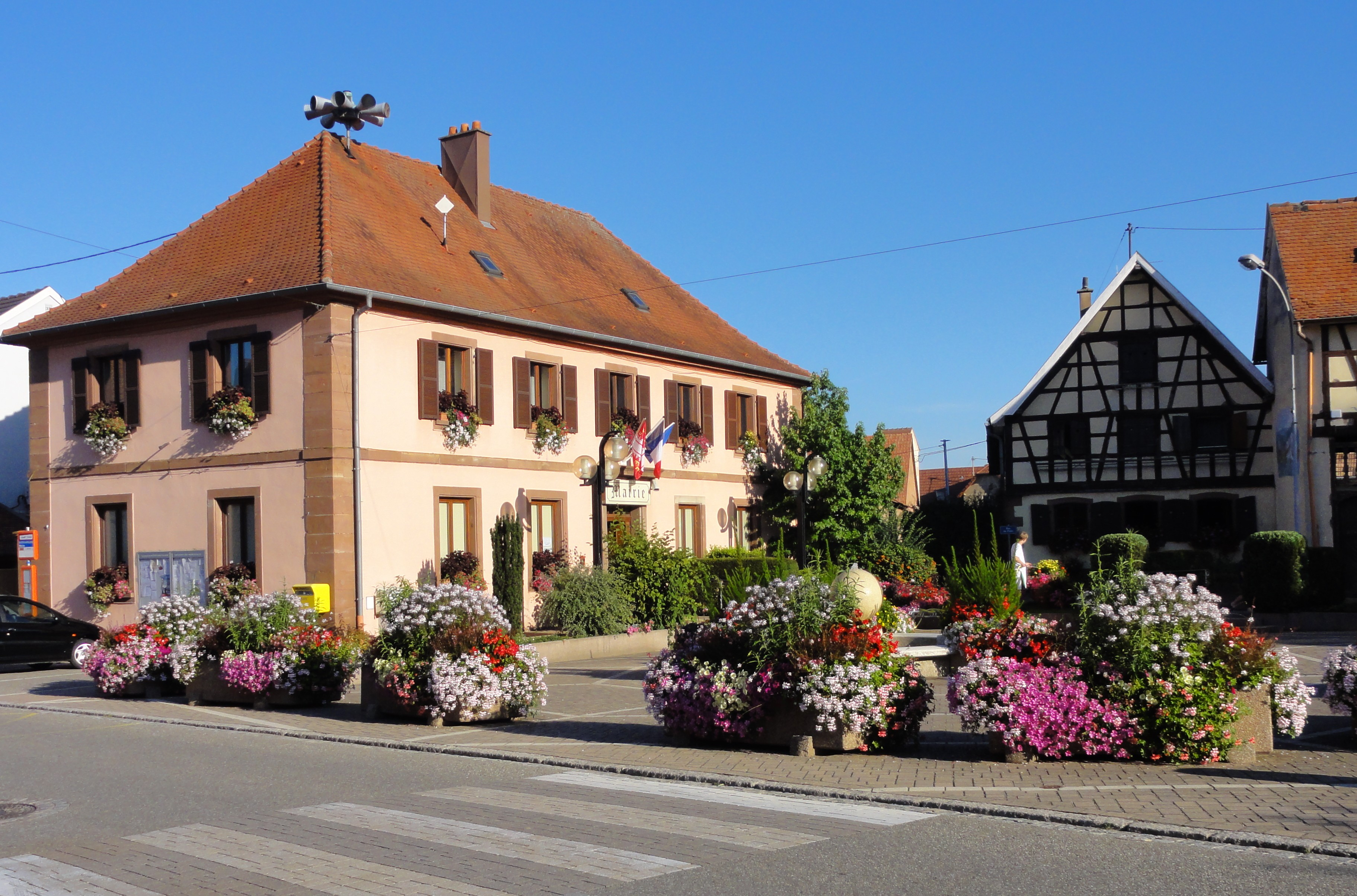 Alsace, Bas-Rhin, Niederschaeffolsheim, Mairie (XIXe). .